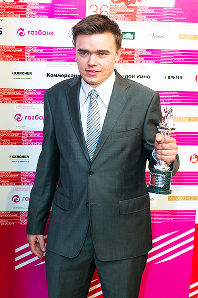 Победитель документальной программы